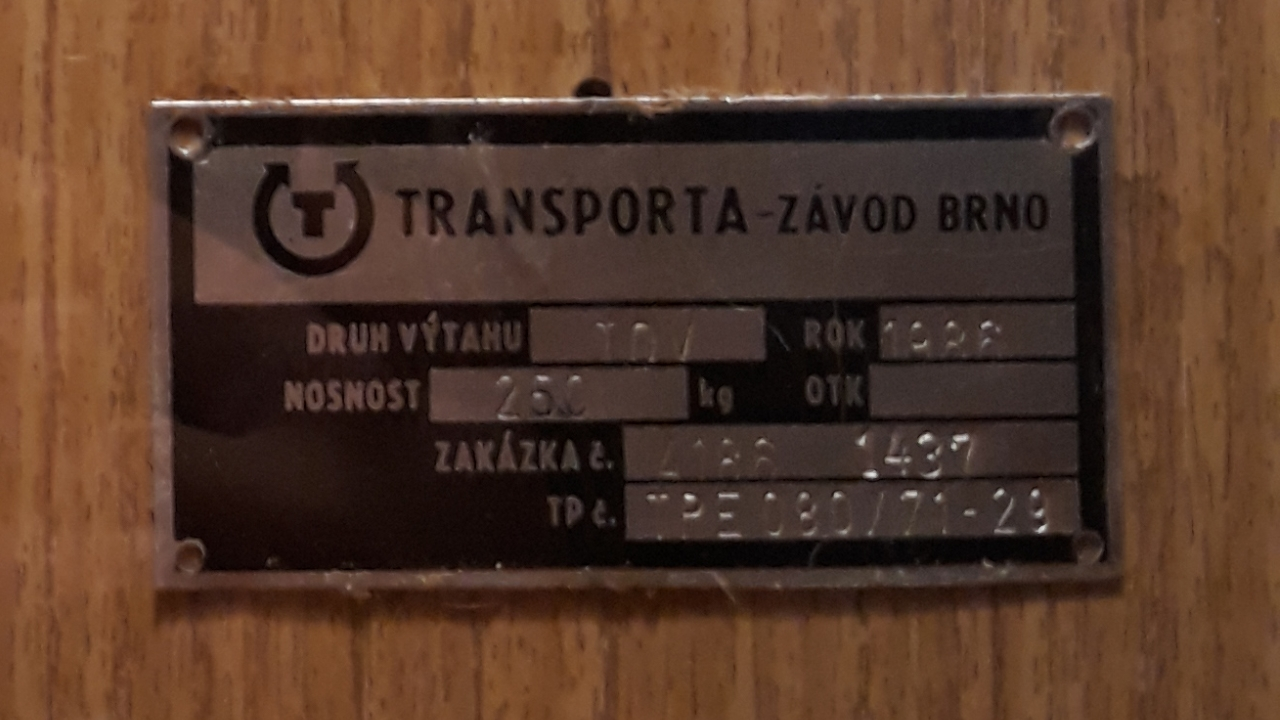 Výtah Transporta, štítek.